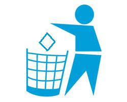 Logo abstencionista, diseñado por Usuario:KillOrDie